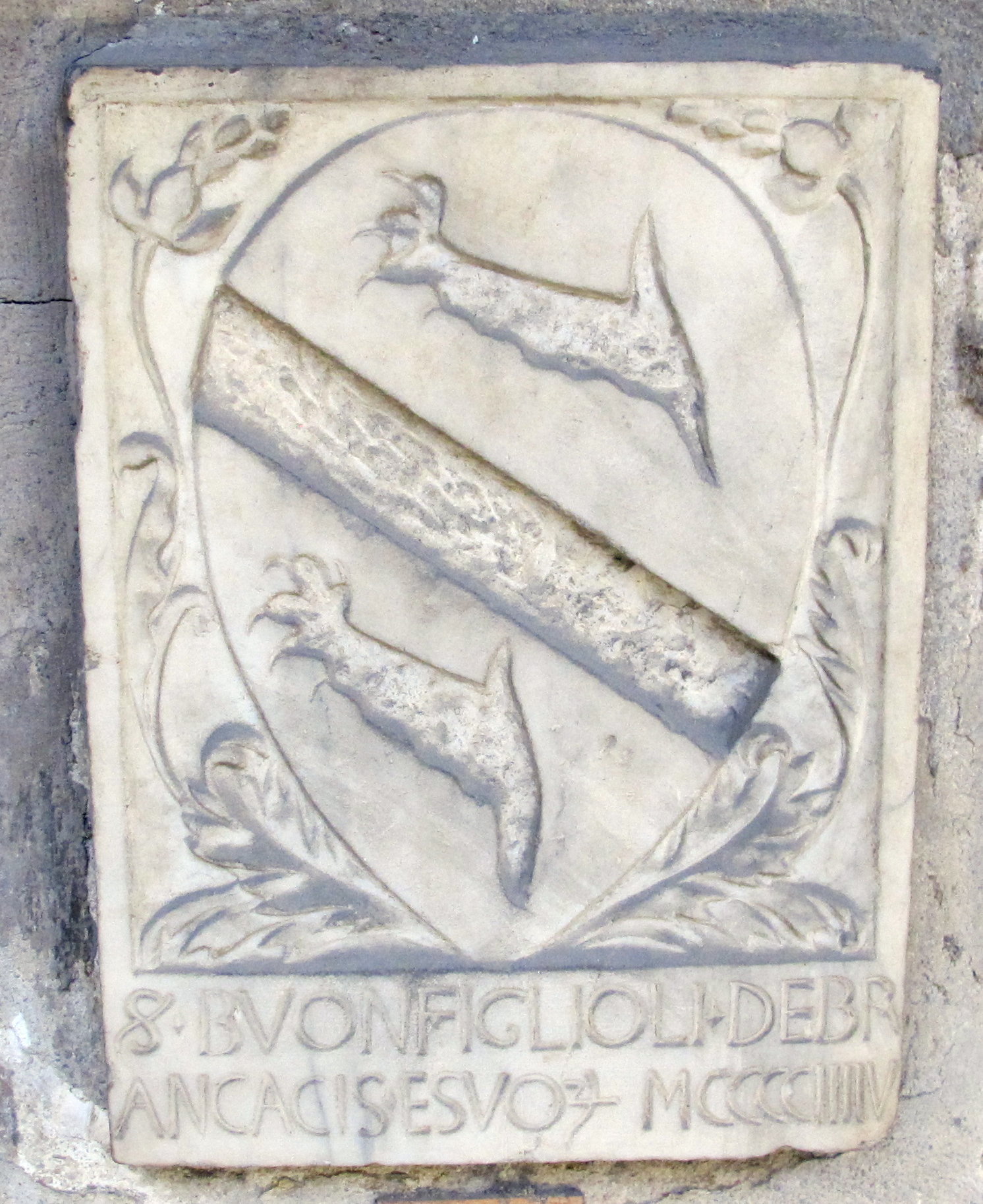 Chiostro dei morti, braccio sud, stemma brancacci